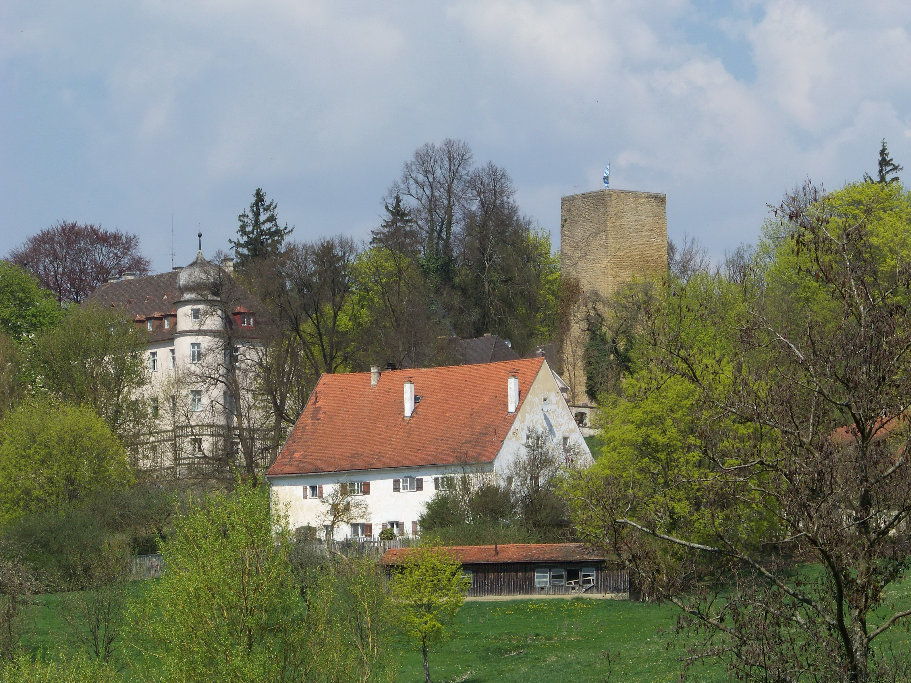 Thalmassing, Neueglofsheim 1. Schloss Haus, dreigeschossiger und gegliederter Dreiflügelbau mit Walmdächern, Westflügel mit Ecktürmen und Zwerchhaus, 1679-81 von Kaspar Pielmayr, 1928 Aufstockung des Westflügels und Bau der zweigeschossigen Torwand; Bergfried, Bruchstein mit Eckquaderung und Grabfuttermauer, wohl 13. Jahrhundert, mit Wallgrabenanlage.